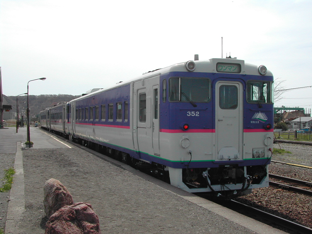 様似駅にて、2002-5-3 撮影